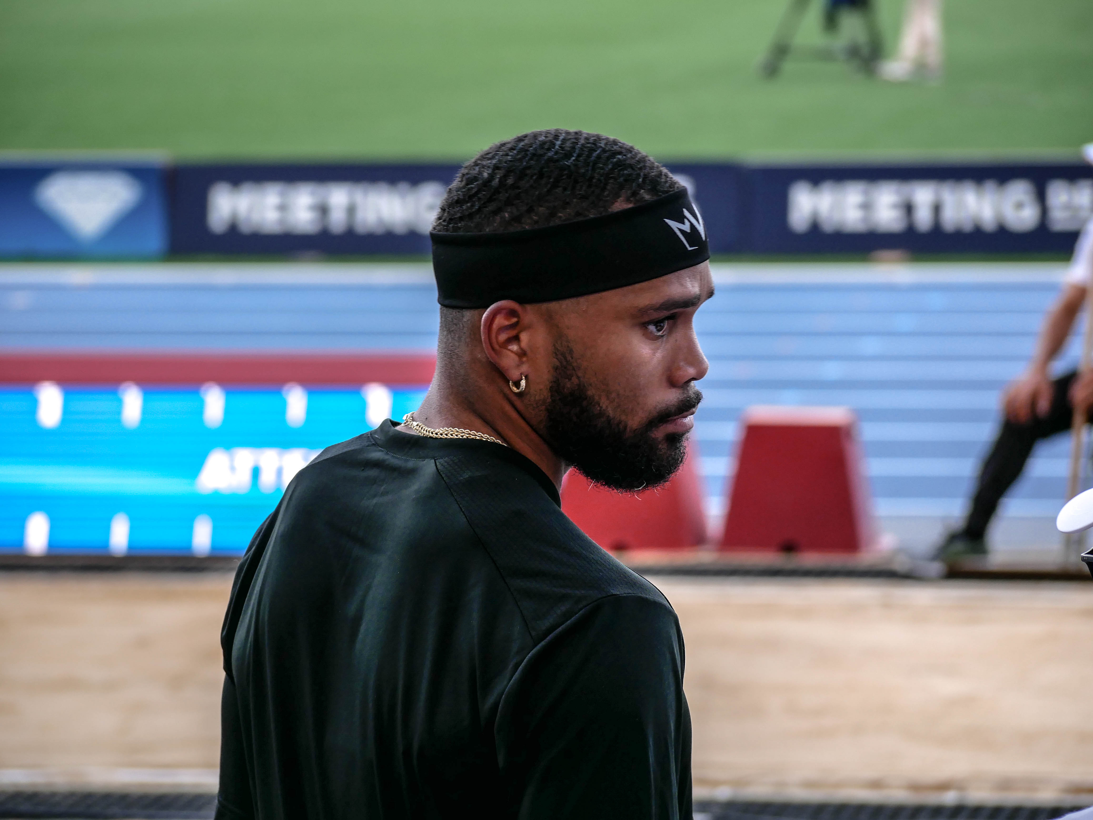 Meeting de Paris 2019 - Compétition d'athlétisme au stade Charlety - 24 août 2019